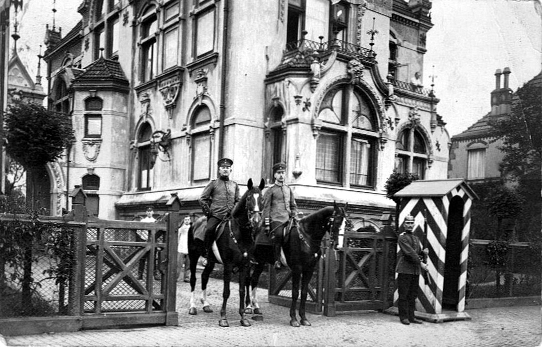 Unterlagen zur Militärlaufbahn und Familie des Königlich Preußischen Generalmajors Georg von Rode. Recherchiert von Rolf Postel, Neumünster. Berittene NMS-Offiziere vor der Kommandeur-Villa, genannt „Obersten-Villa“, Commandantur-Gebäude, Mühlenhof 49, Neumünster/Holstein. (Es wurde die Vermutung angestellt, bei dem rechten Reiter könnte es sich um Georg von Rode handeln.)